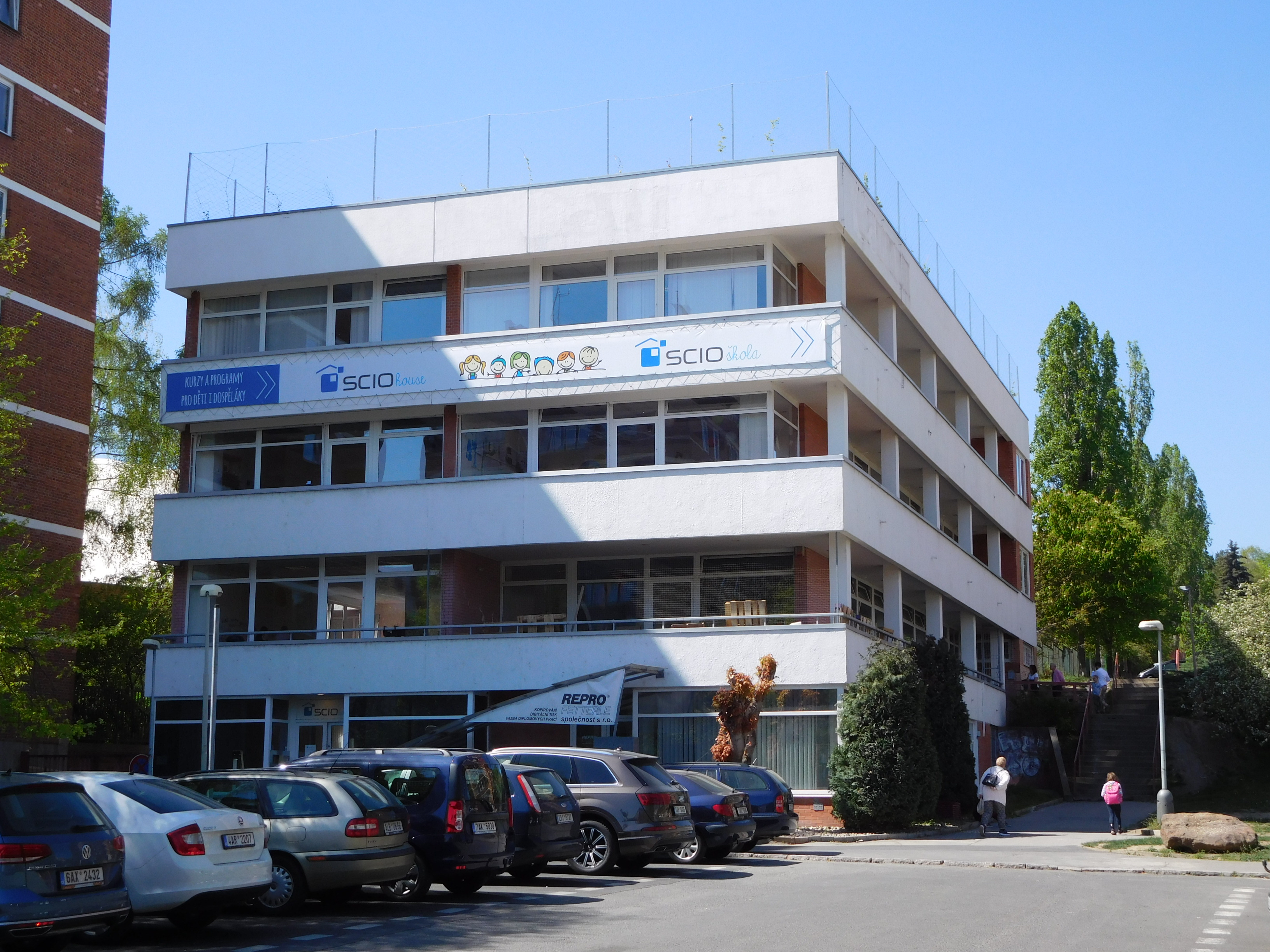 Praha - Dejvice, náměstí Na Santince 5, Scio škola